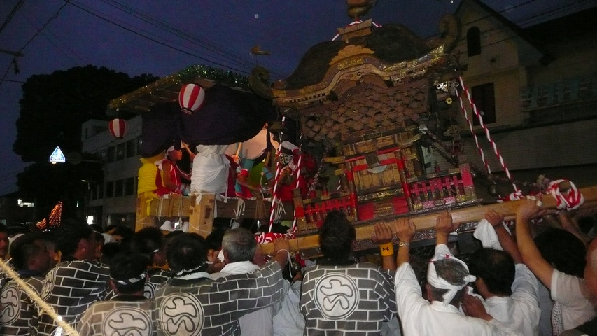 ヨイマカ（宮崎県国富町）